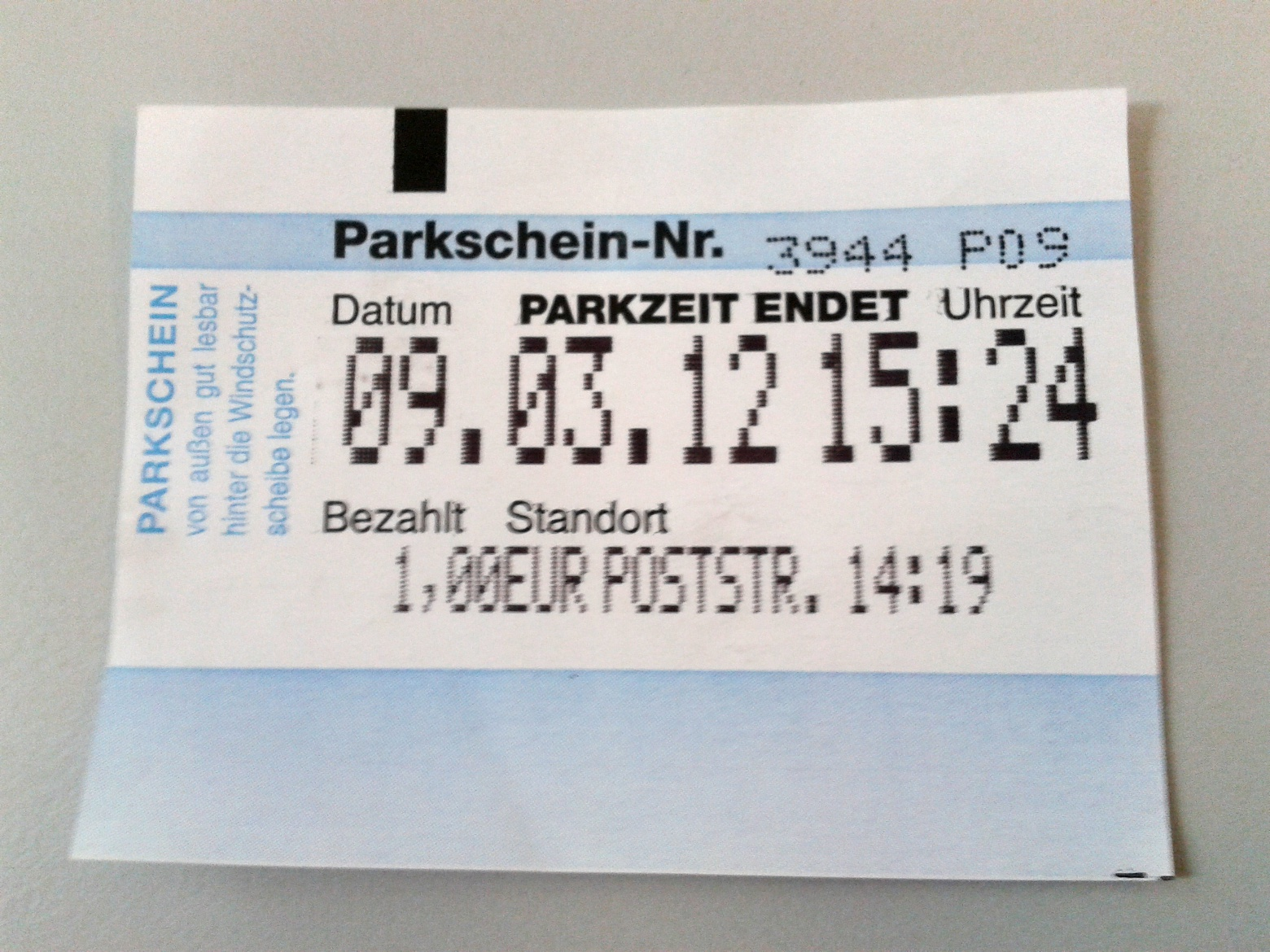 Parkschein in Heidelberg